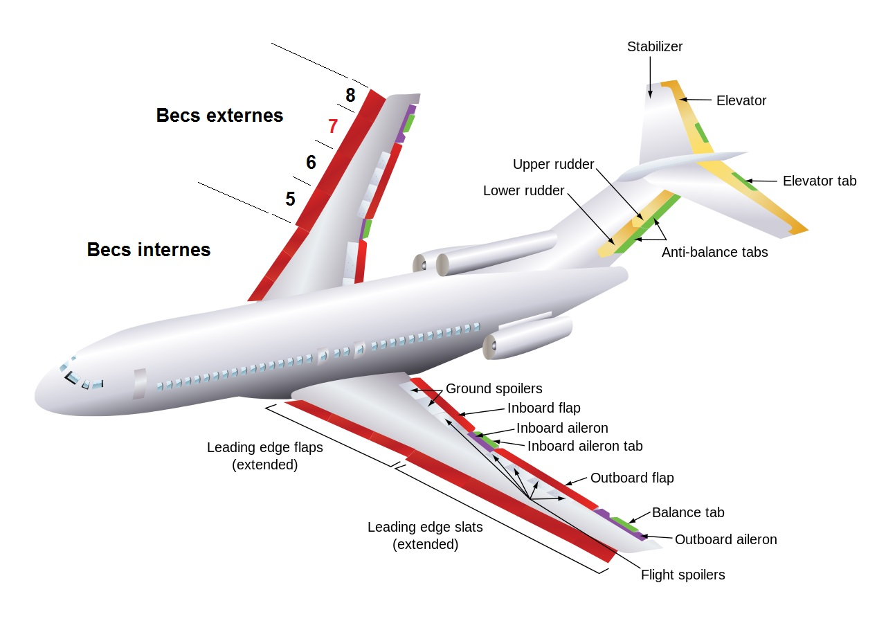 Schéma explicant la répartition des becs de bord d'attaque sur l'aile d'un Boeing 727.